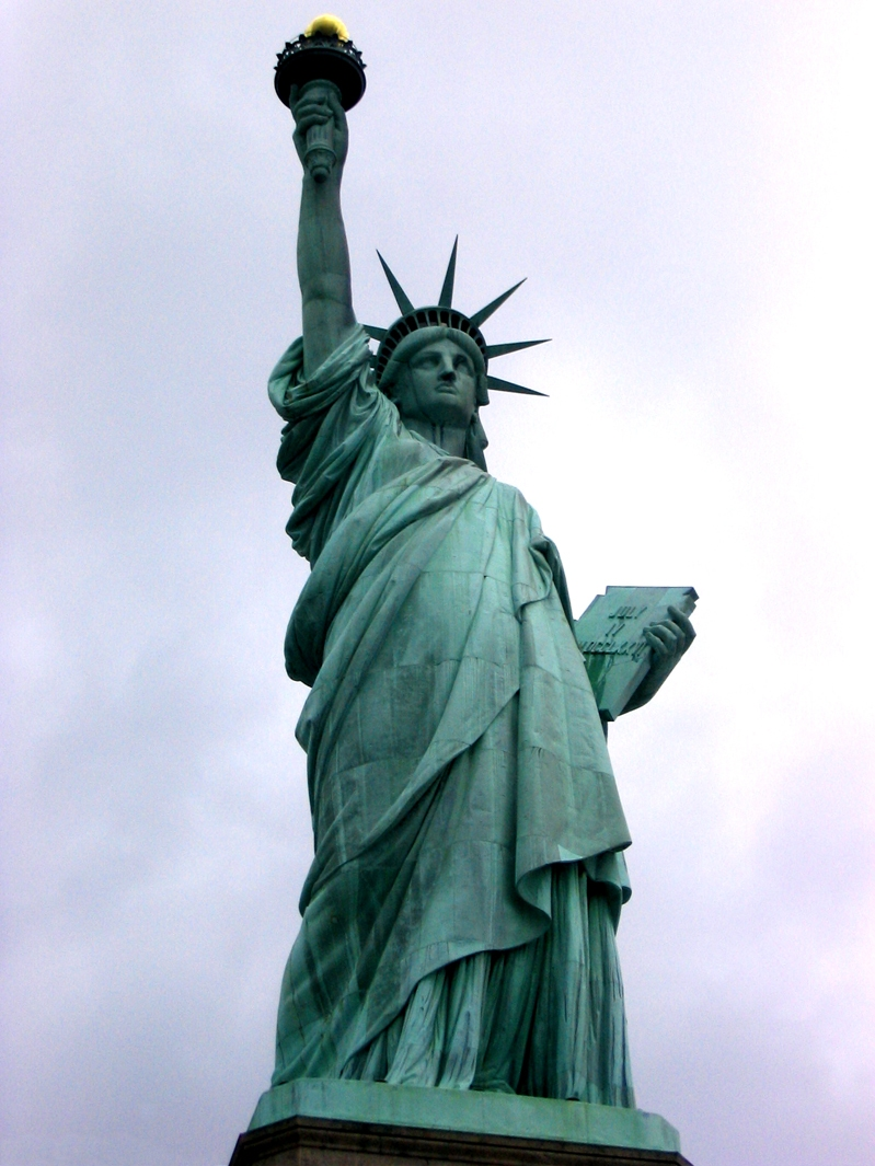 Vryheidsbeeld.Statue of Liberty - USA